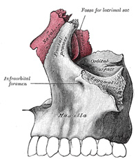 veido kaulas